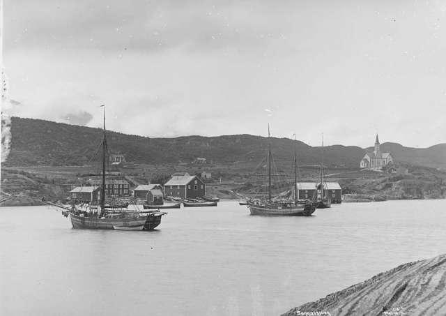 Sandnessjøen med Sandnessjøen kyrkje